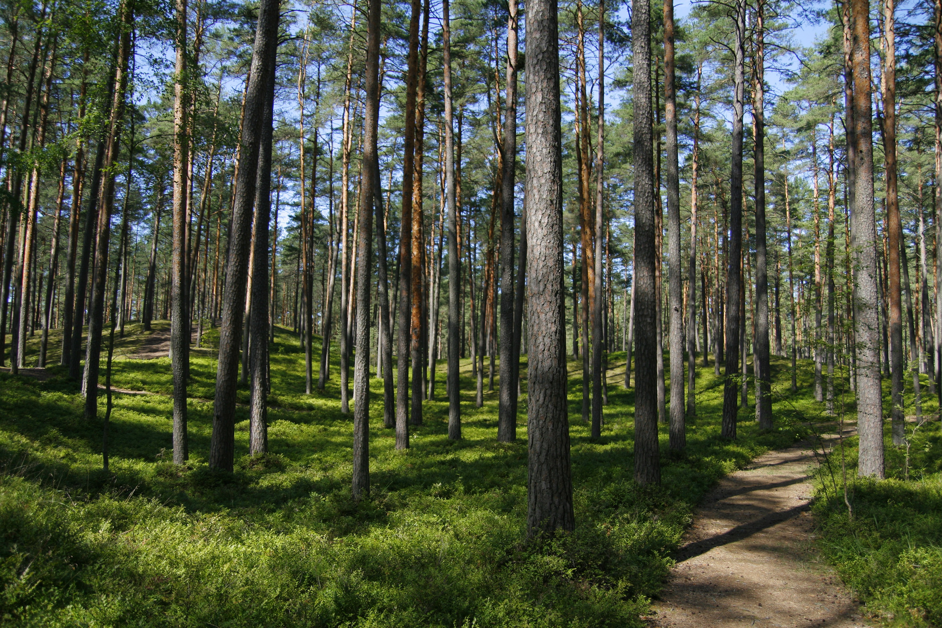 Beberbeķu Nature Park, July 2007